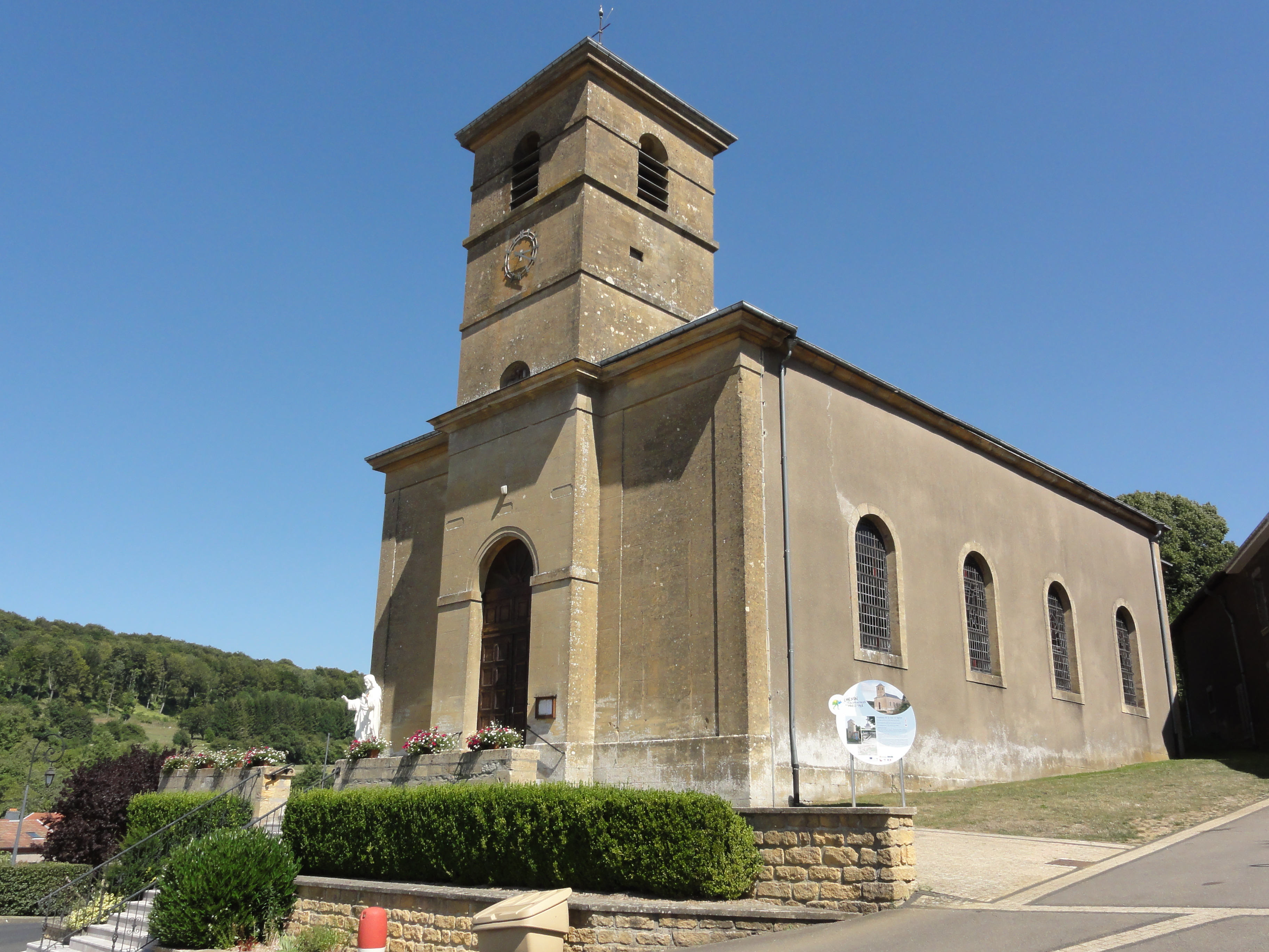 Saint-Pancré (Meurthe-et-M.) église Saint-Pancrace